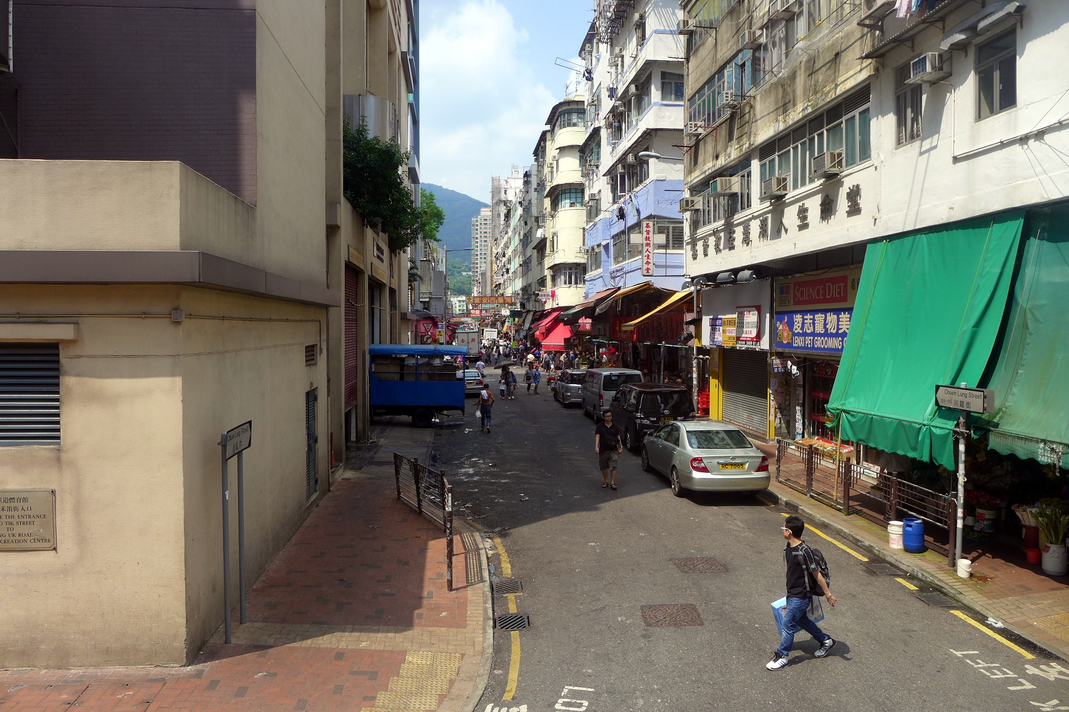 KChuen Lung Street